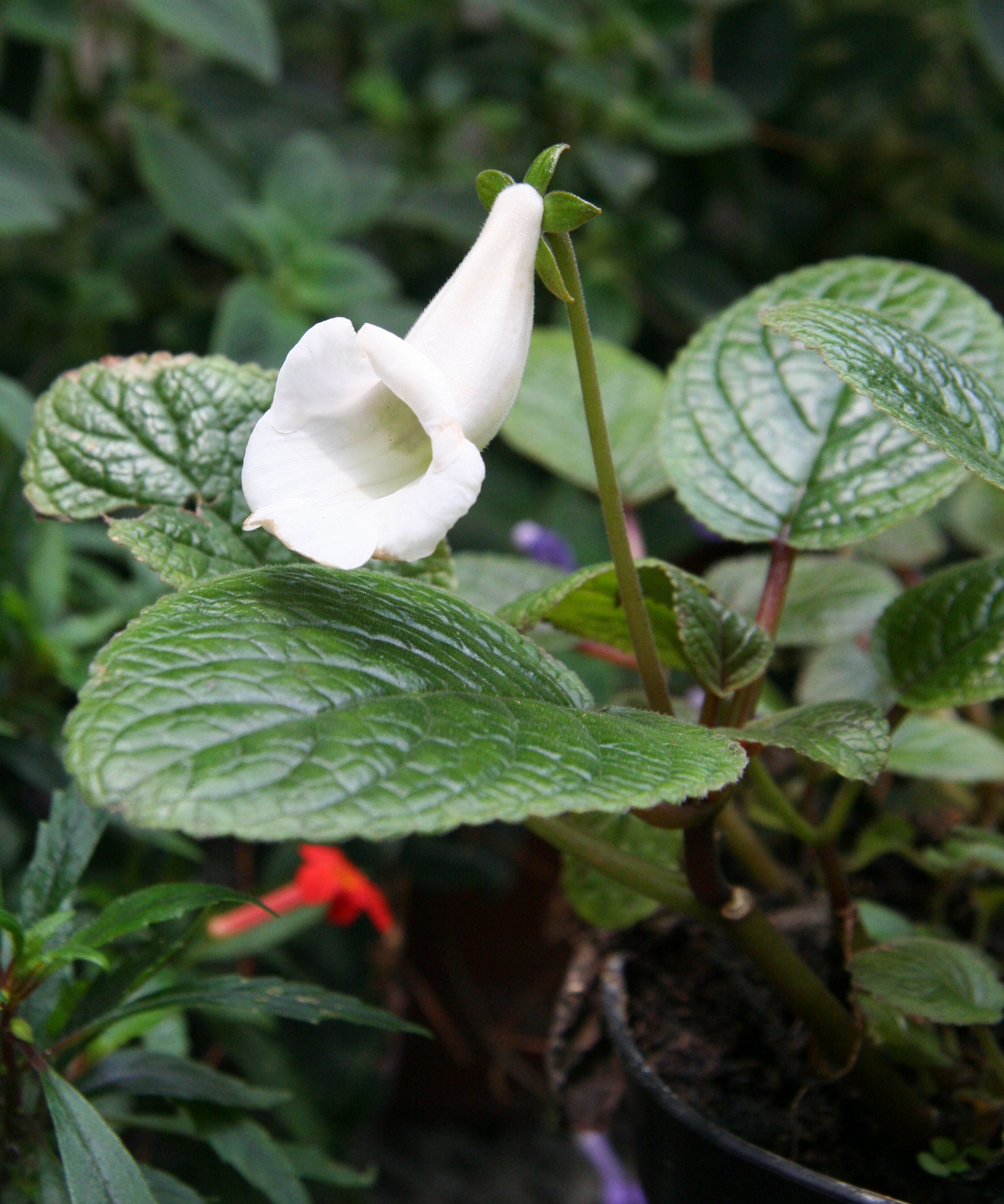 Sinningia eumorpha im Botanischen Garten Lund